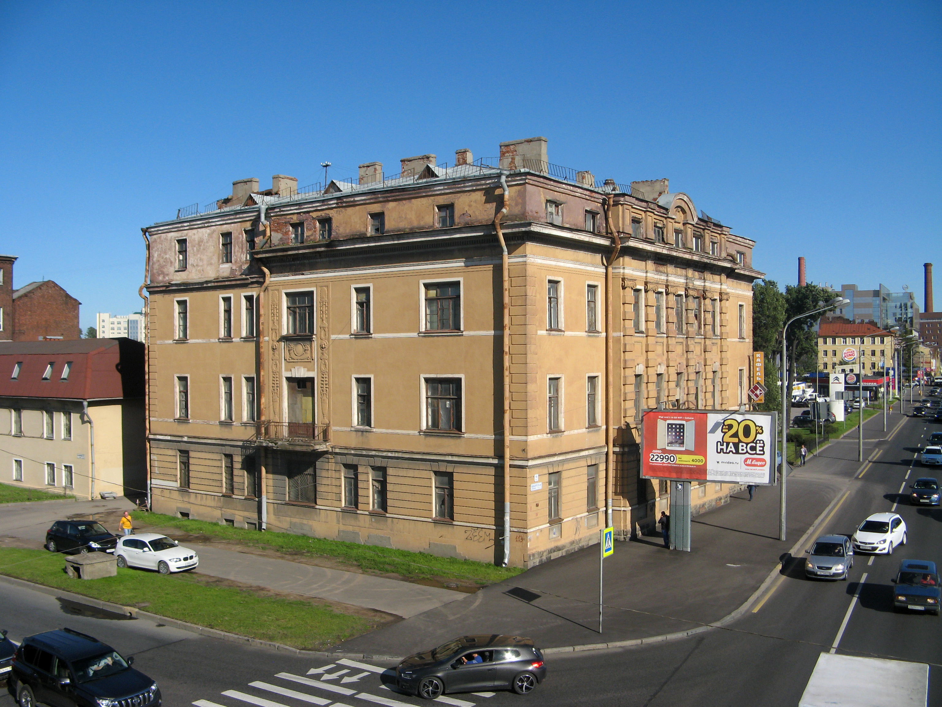 Жилой дом: Выборгская набережная, 59 корпус 1, Кантемировская улица, Выборгский район, Санкт-Петербург